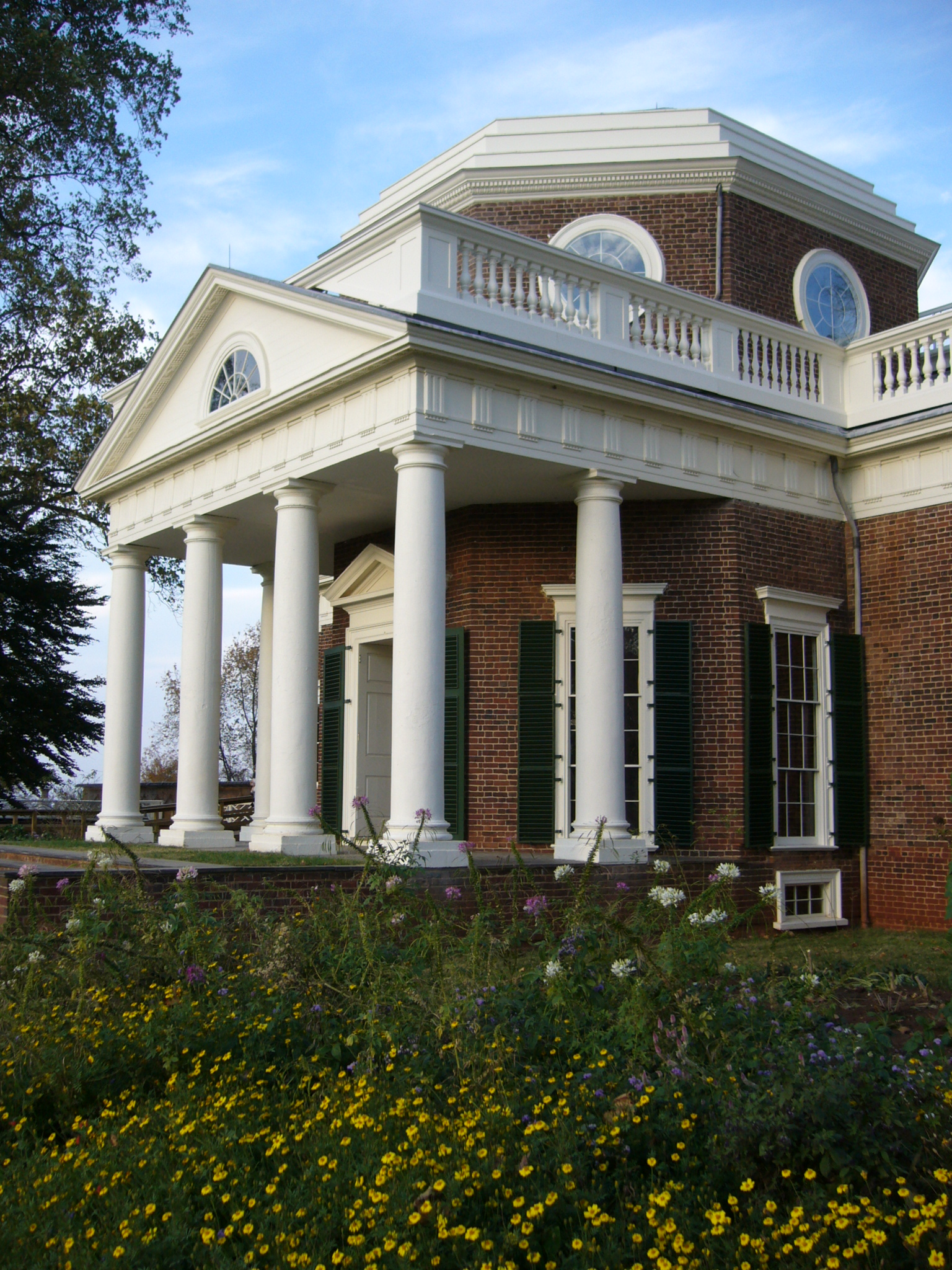 Rear neoclassical facade of Monticello.